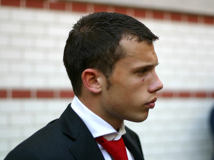 John Heitinga